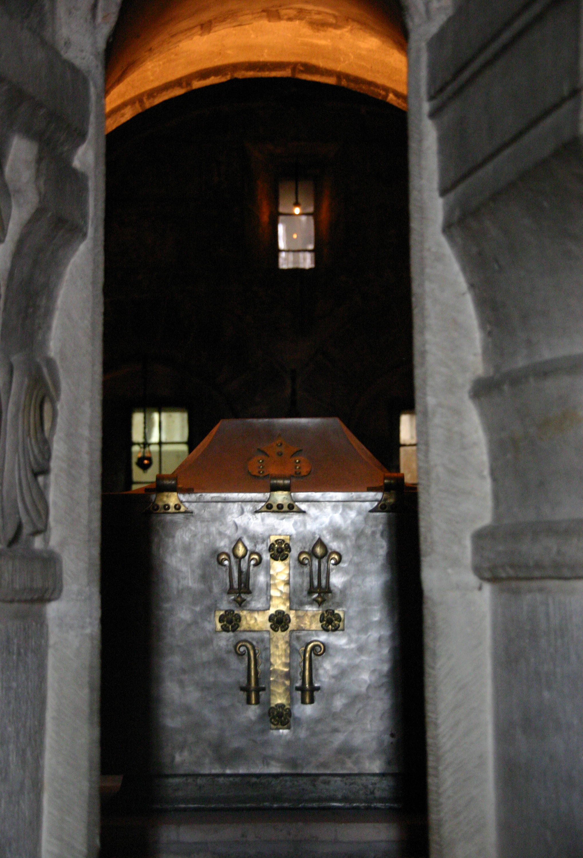 Saint-Benoît-sur-Loire